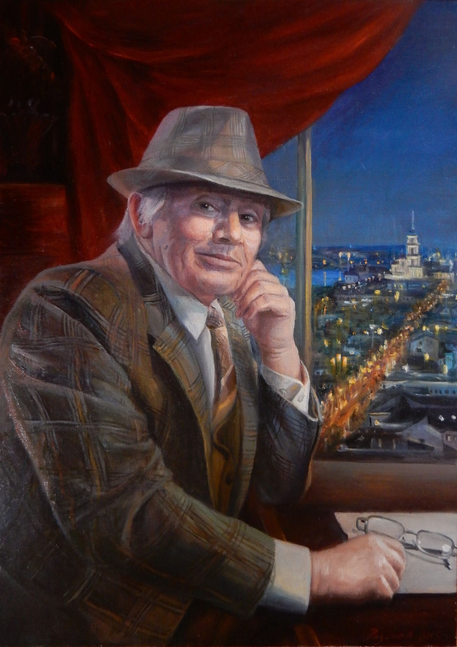 Актёр Рыбинского драматического театра Анатолий Поздняков. 2015 г. Холст, масло, 70х50см